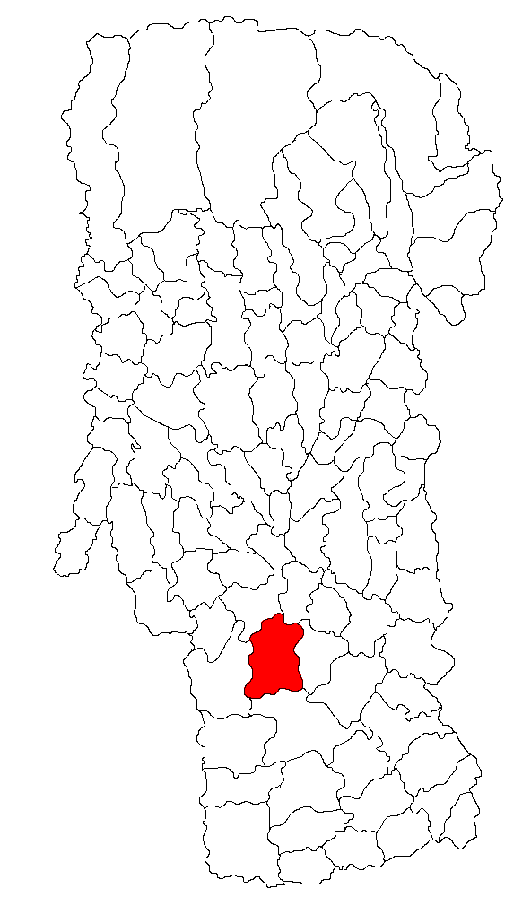 Categorie:Hărţi ale judeţului Argeş